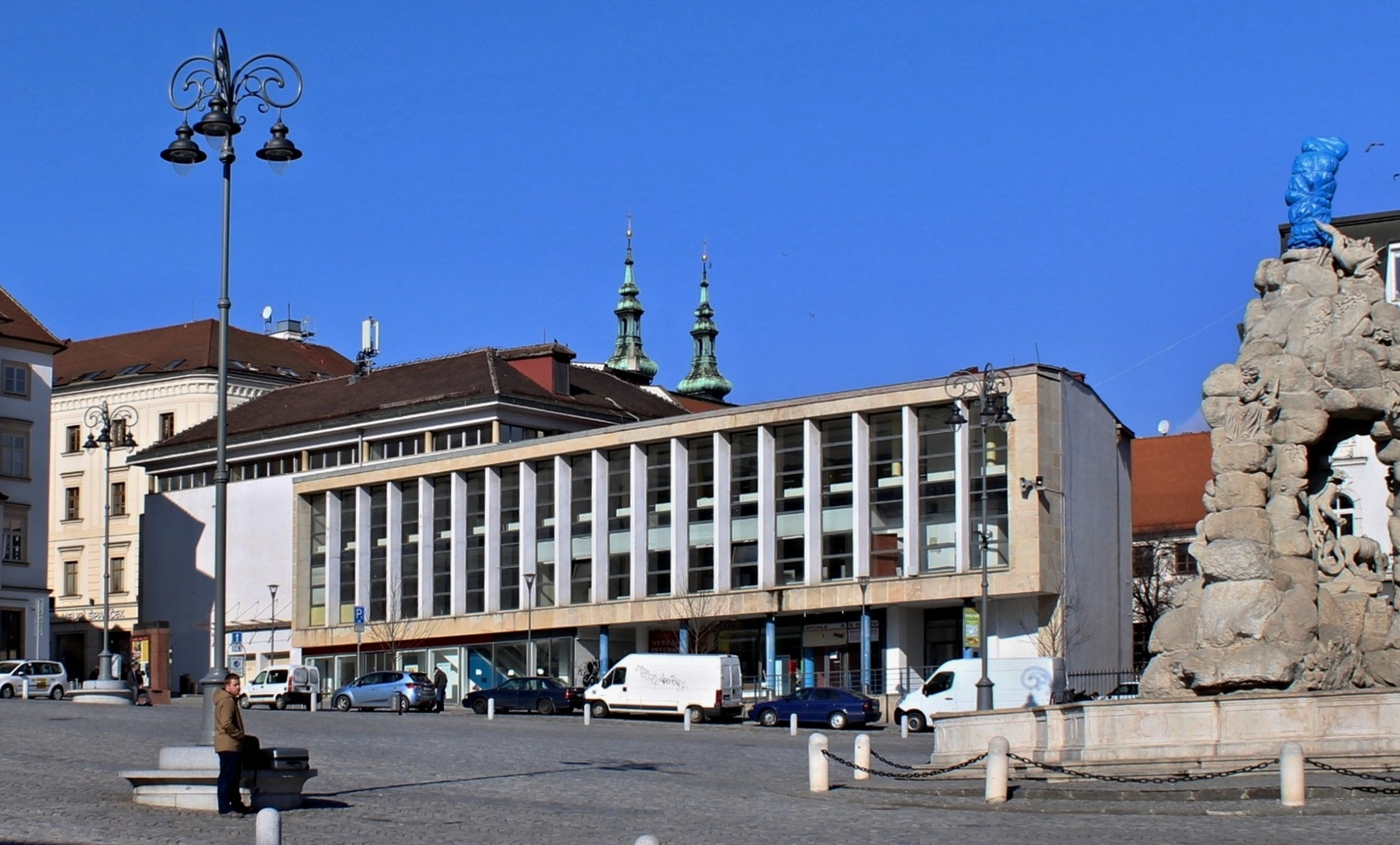 Zelný trh (Brno)